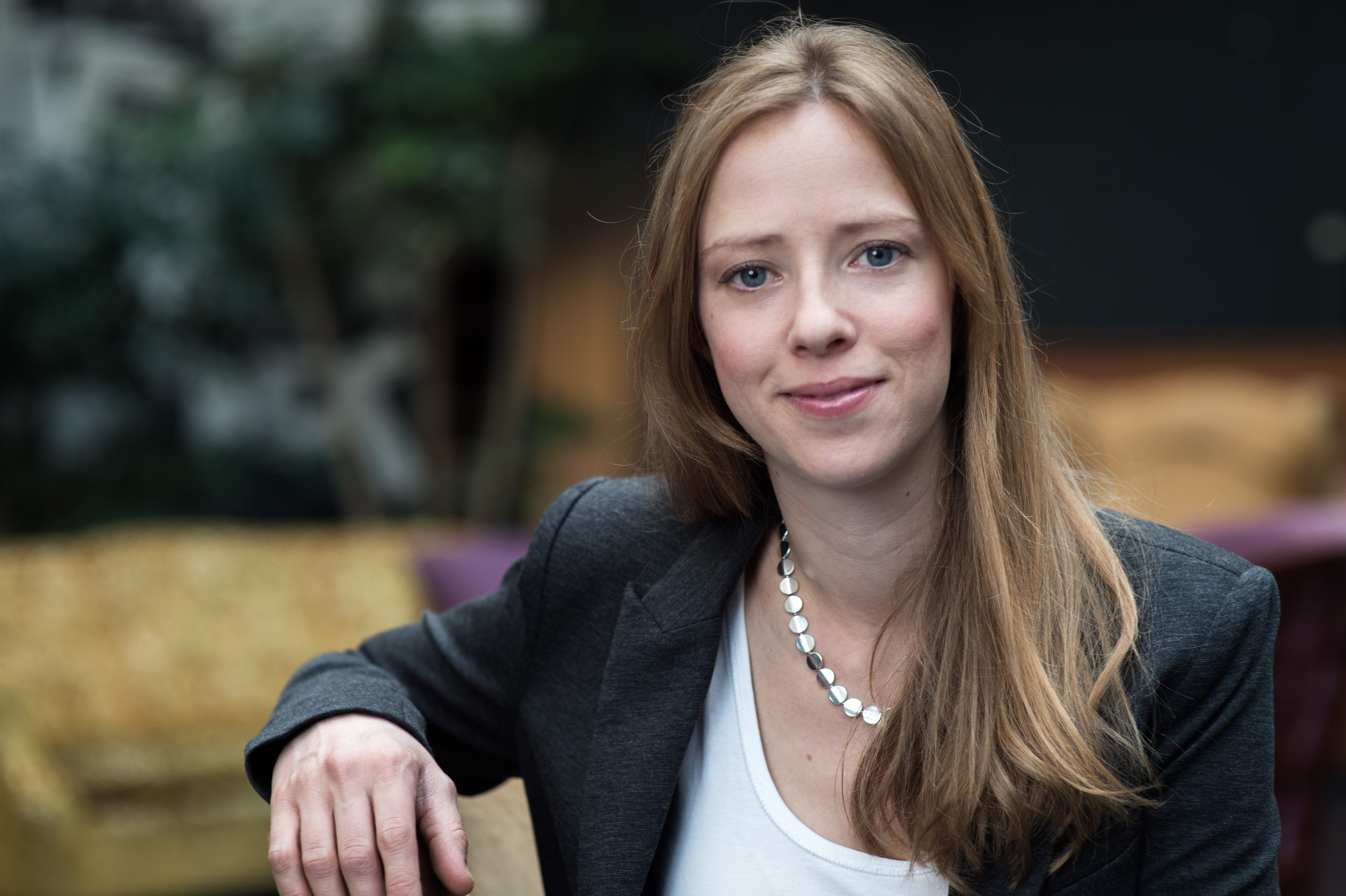 Pressbild på Åsa Lindhagen